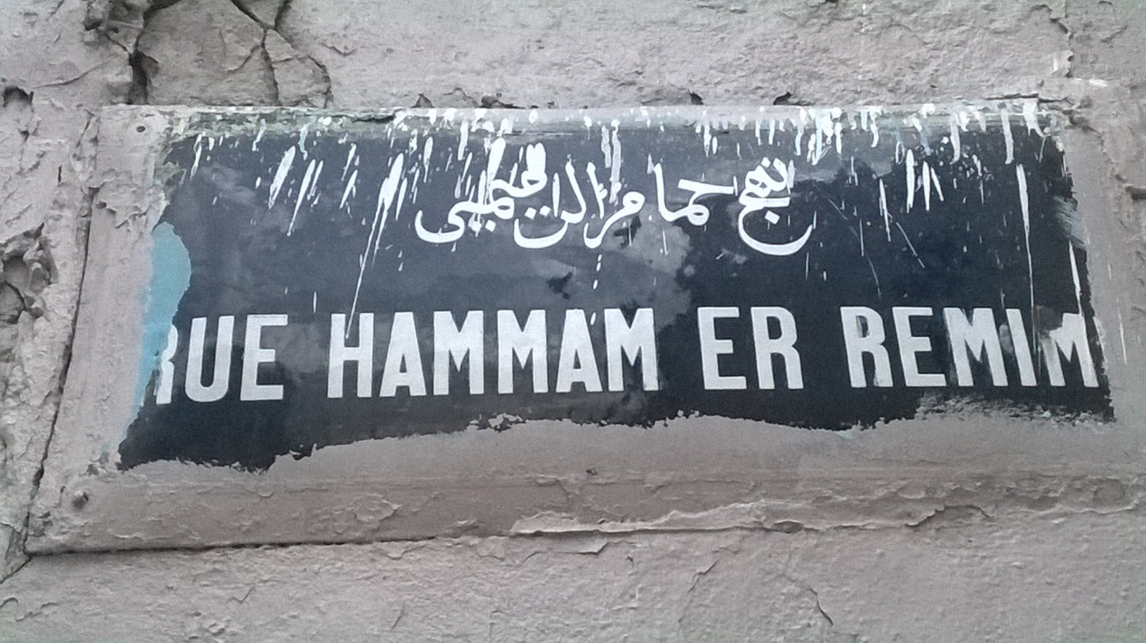 Bab Souika , Tunis باب سويقة ، تونس